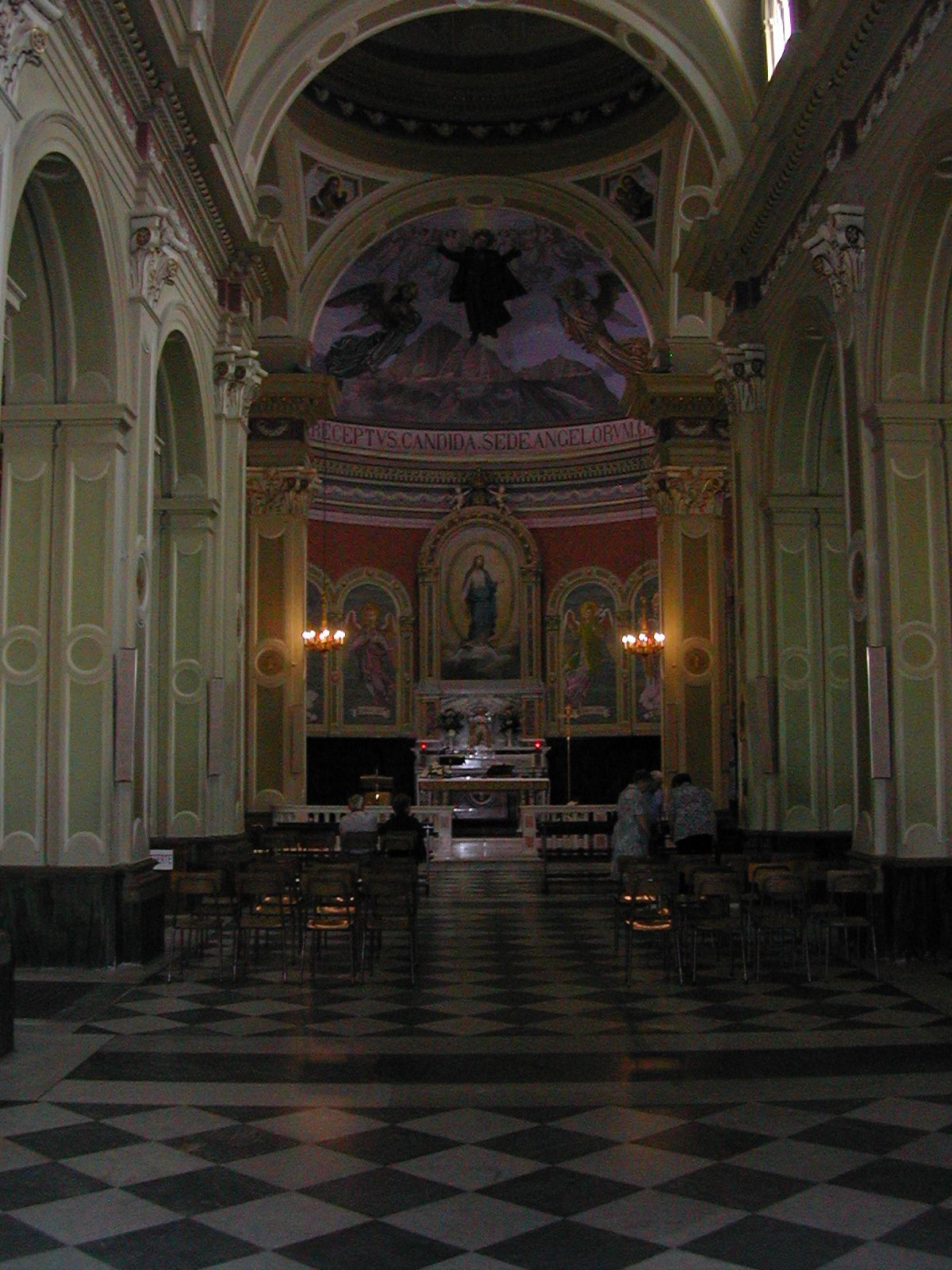 Santuario di San Gabriele dell'Addolorata ad Isola del Gran Sasso d'Italia, in Italia